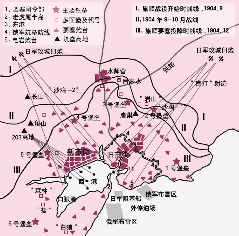 日俄战争中的旅顺战役。